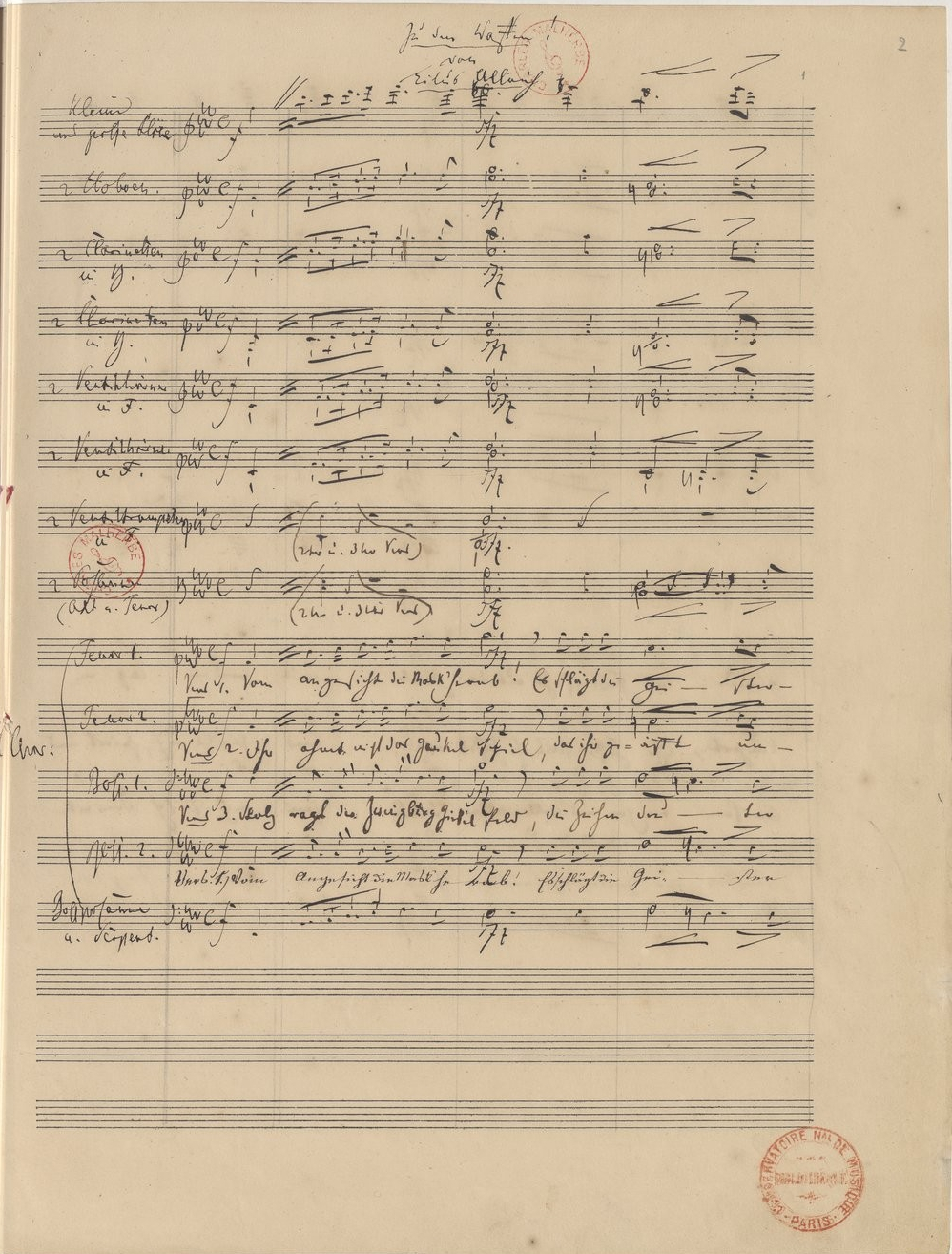 Zu den Waffen, erster der Drei Freiheitsgesänge für vier Männerstimmen mit Harmoniemusik von Robert Schumann